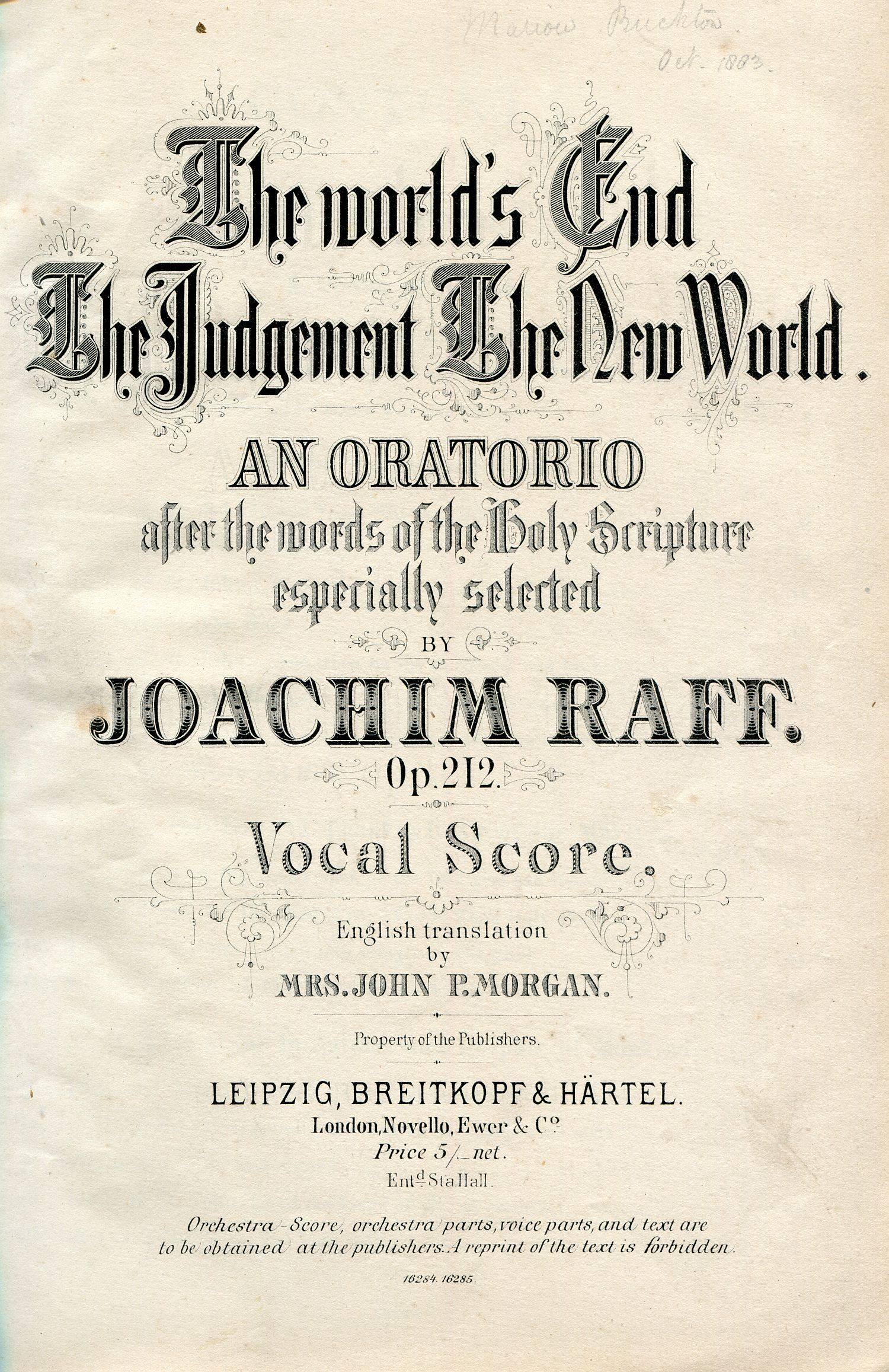 Vocal Score of the English translation